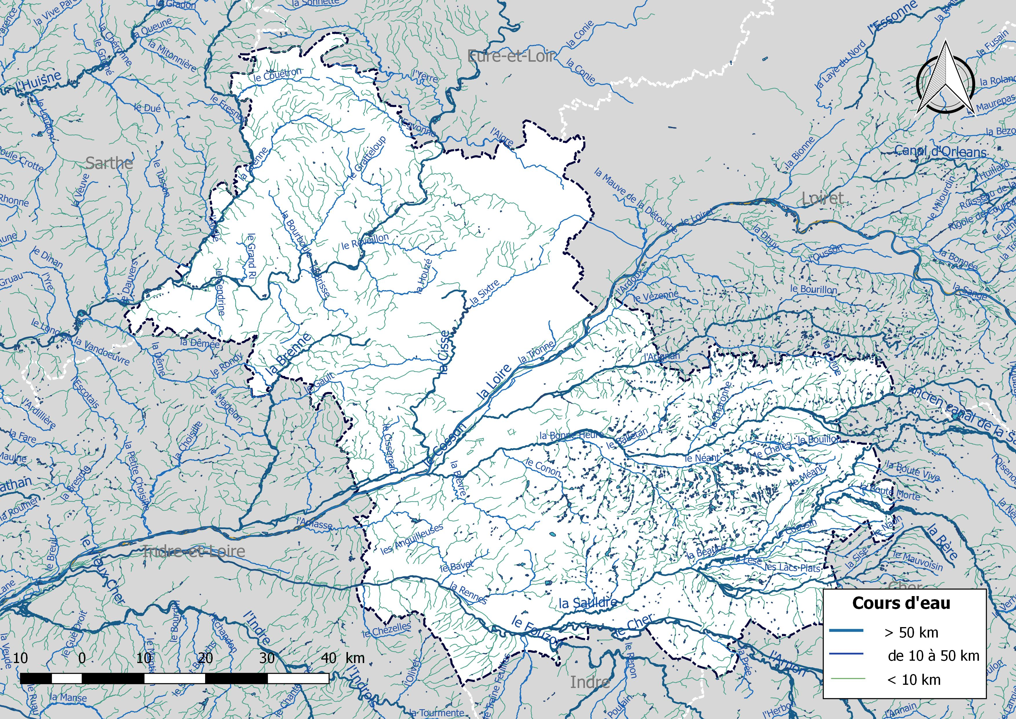 Réseau hydrographique du département de Loir-et-Cher (France).